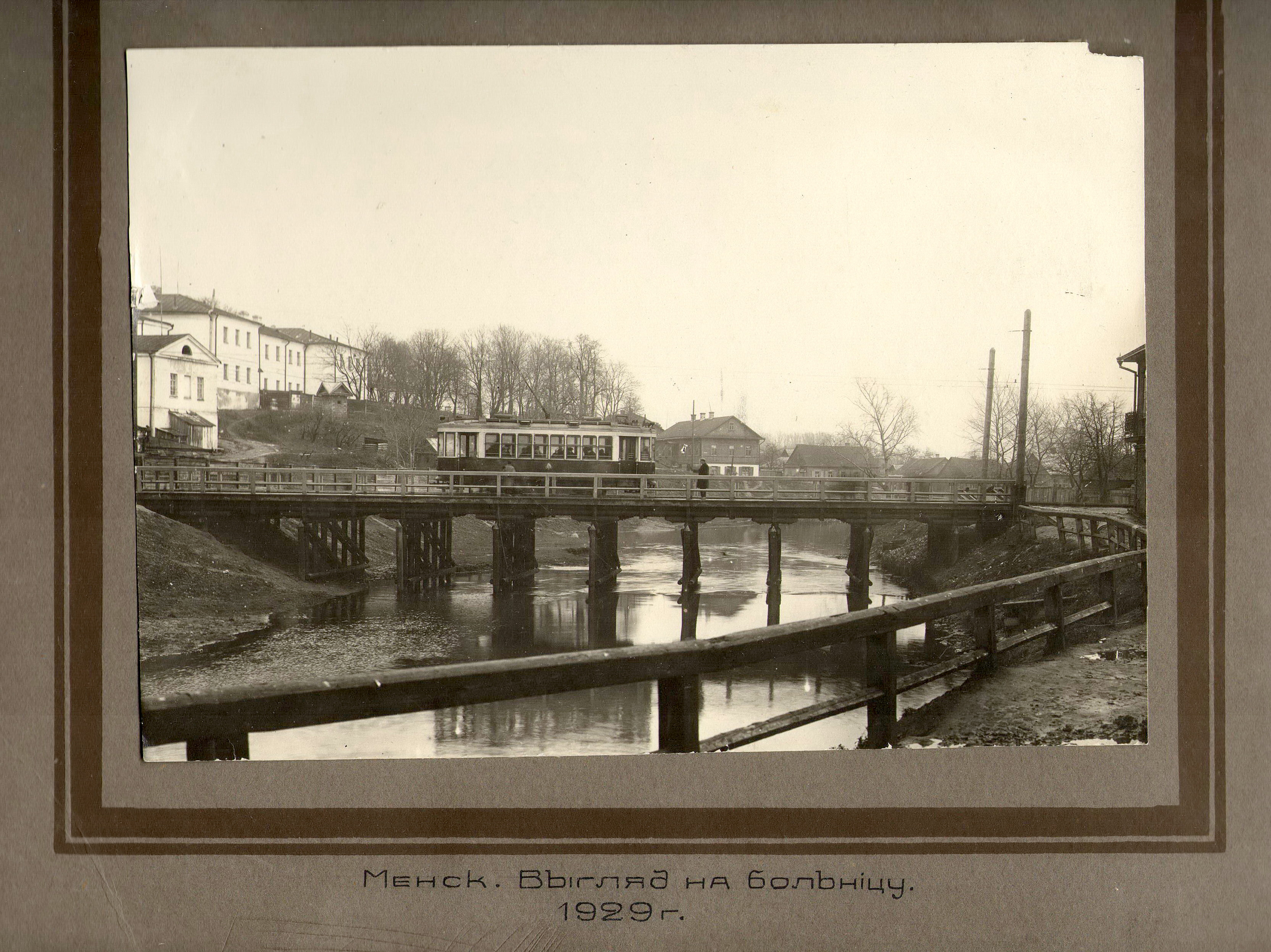 Беларуская (тарашкевіца): Менск (Miensk), трамвайны мост церазь Сьвіслач (Śvisłač) у бок Траецкай гары (Trajeckaja hara). Траецкі манастыр базылянак